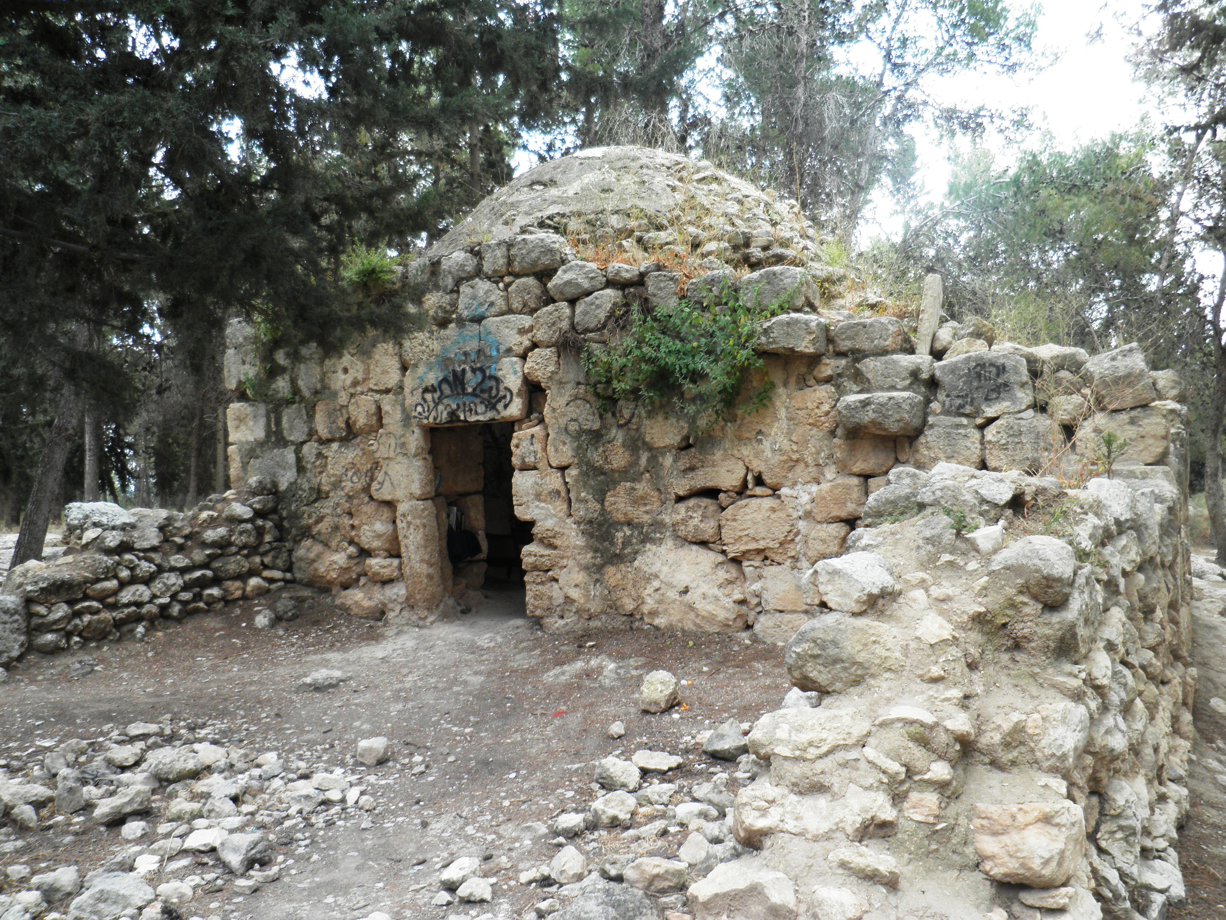 קבר מתיתיהו בן יוחנן כהן גדול